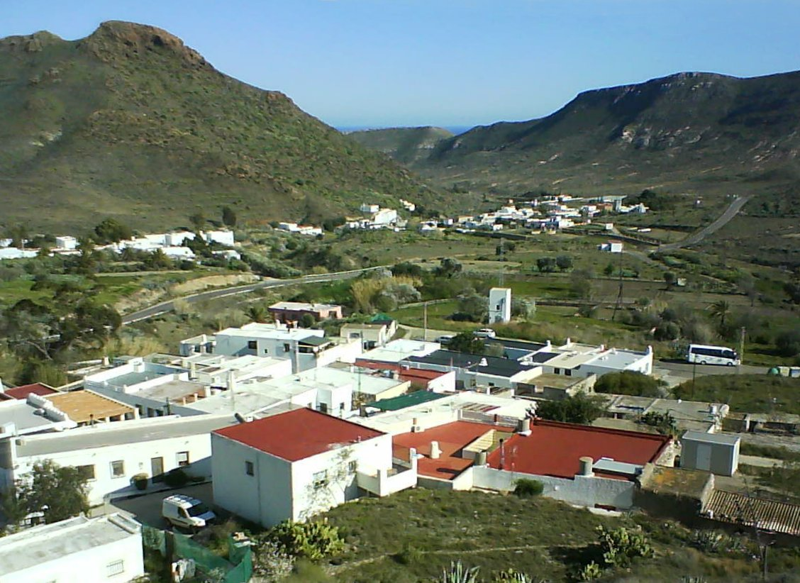 Vista desde el cerro, de la cañada de Las Hortichuelas, en Almería (España).